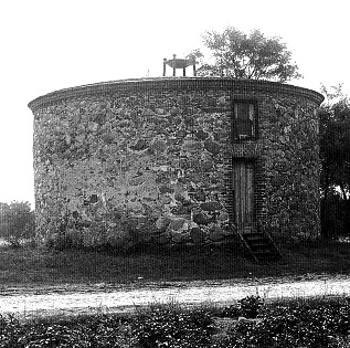 Bismark-Turm in Lichtenberg (Frankfurt (Oder)) 1906